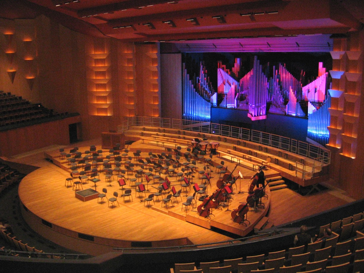 orgue de l'Auditorium Maurice-Ravel de Lyon